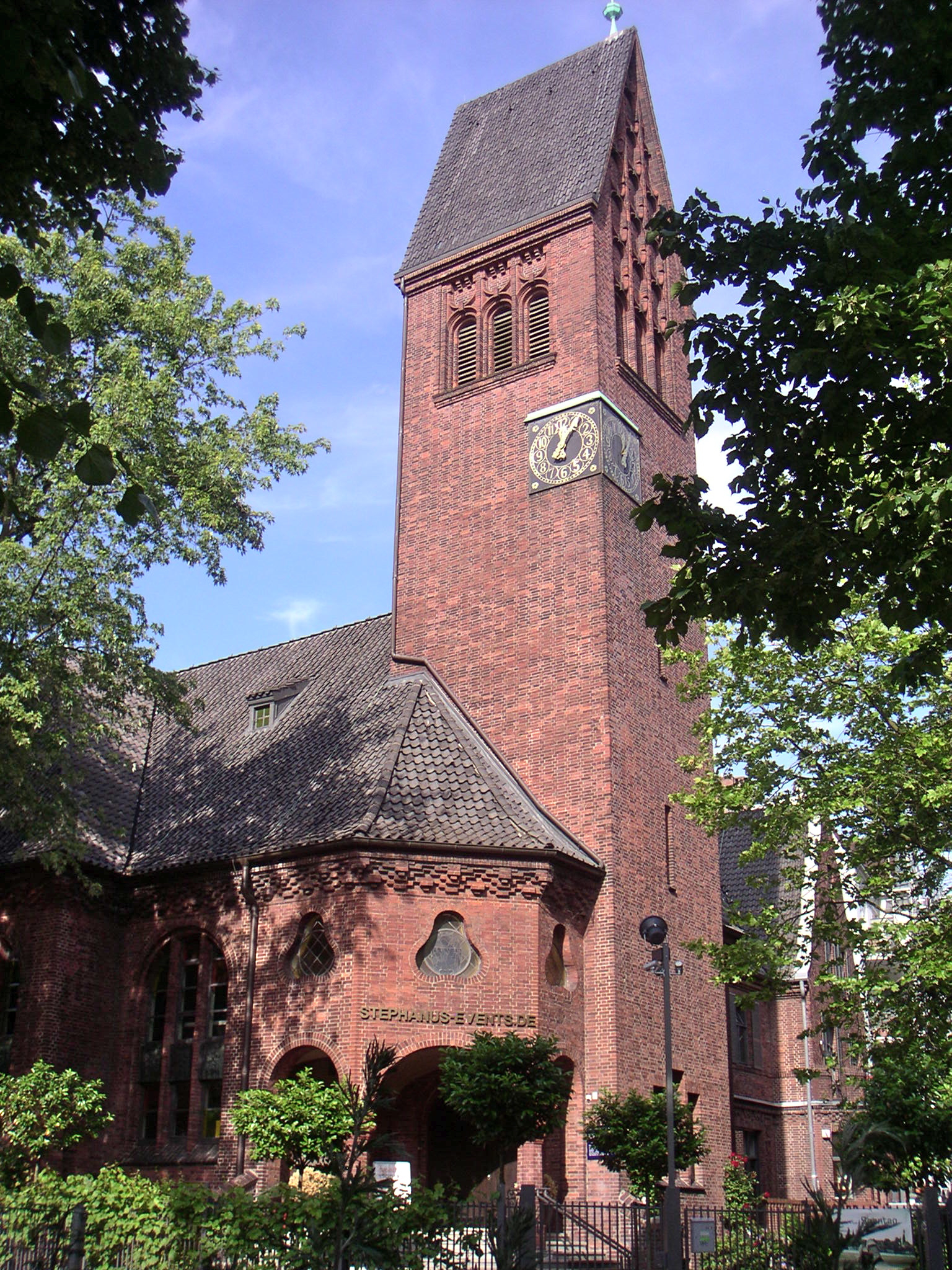 Hamburg-Eimsbüttel, Stephanus-Events, Gesamtansicht (ehemalige evangelisch-lutherische Sephanuskirche, erbaut 1912-1913 nach Entwurf der Hamburger Architekten Hermann Distel und August Grubitz)